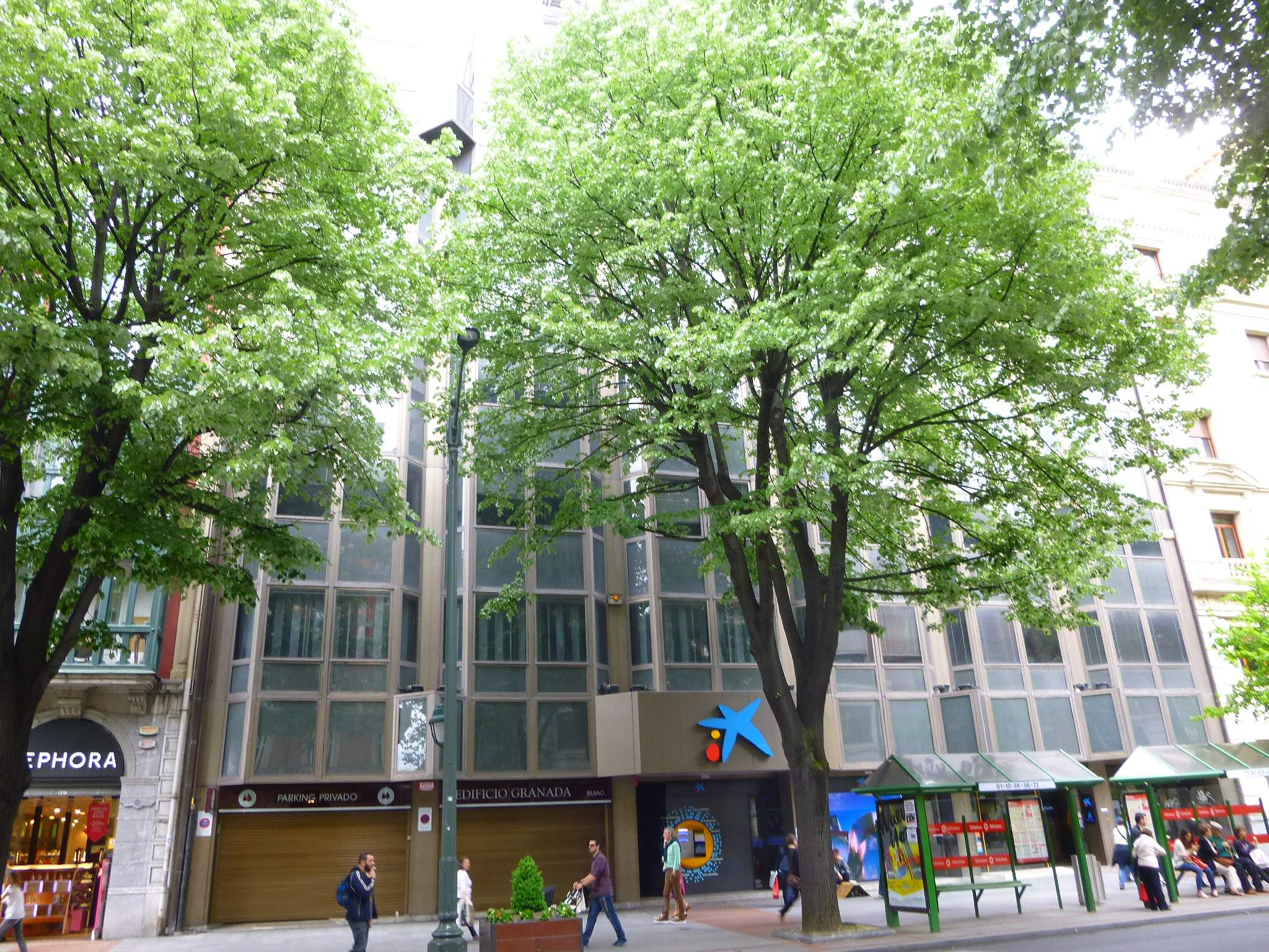 Oficinas Granada (Bilbao)